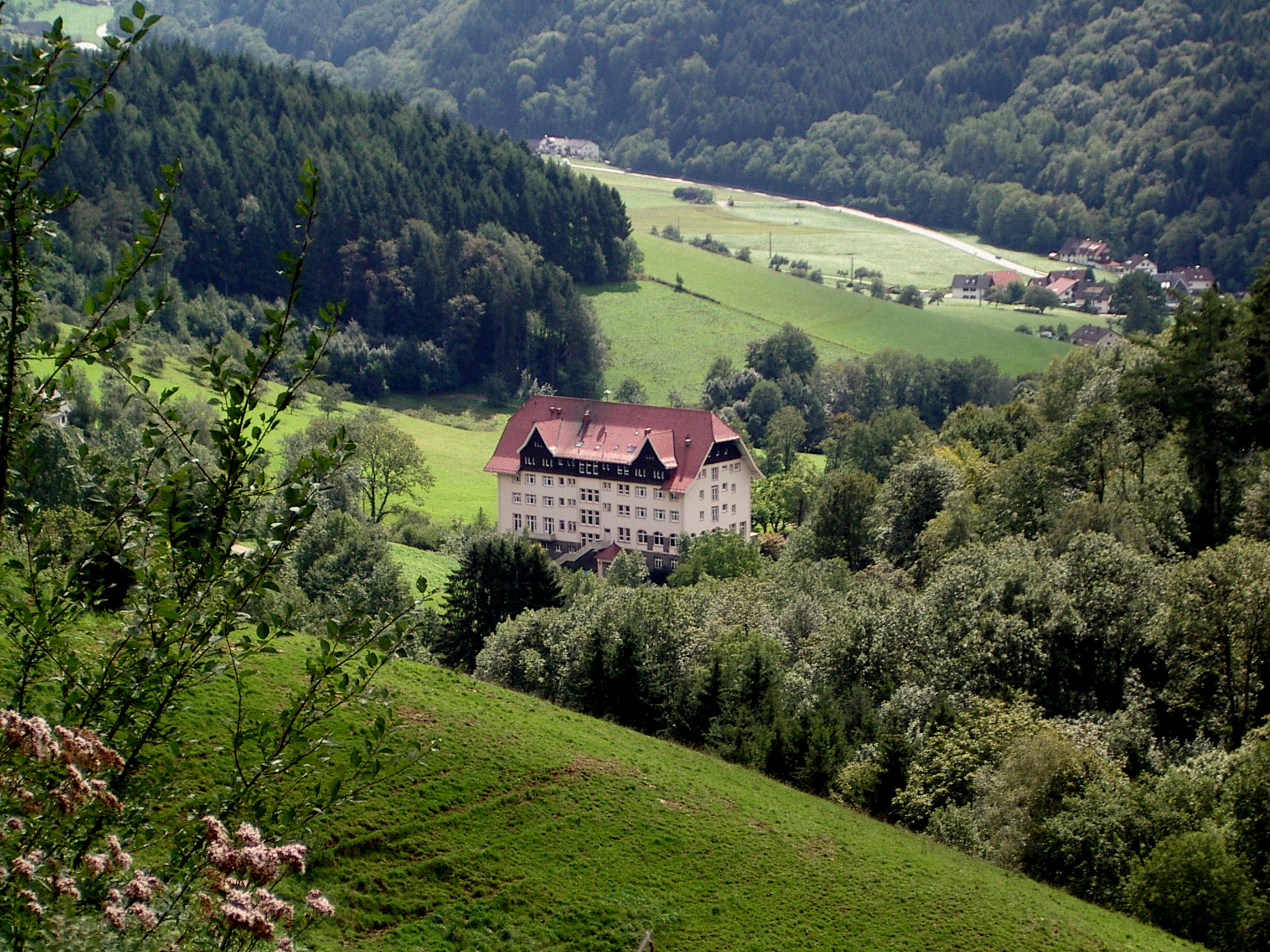 Der Carlsbau im Glottertal, bekannt geworden durch die Serie "Schwarzwaldklinik", zur Zeit der Dreharbeiten war es die Klinik Glotterbad der Landesversicherungsanstalt Württemberg.